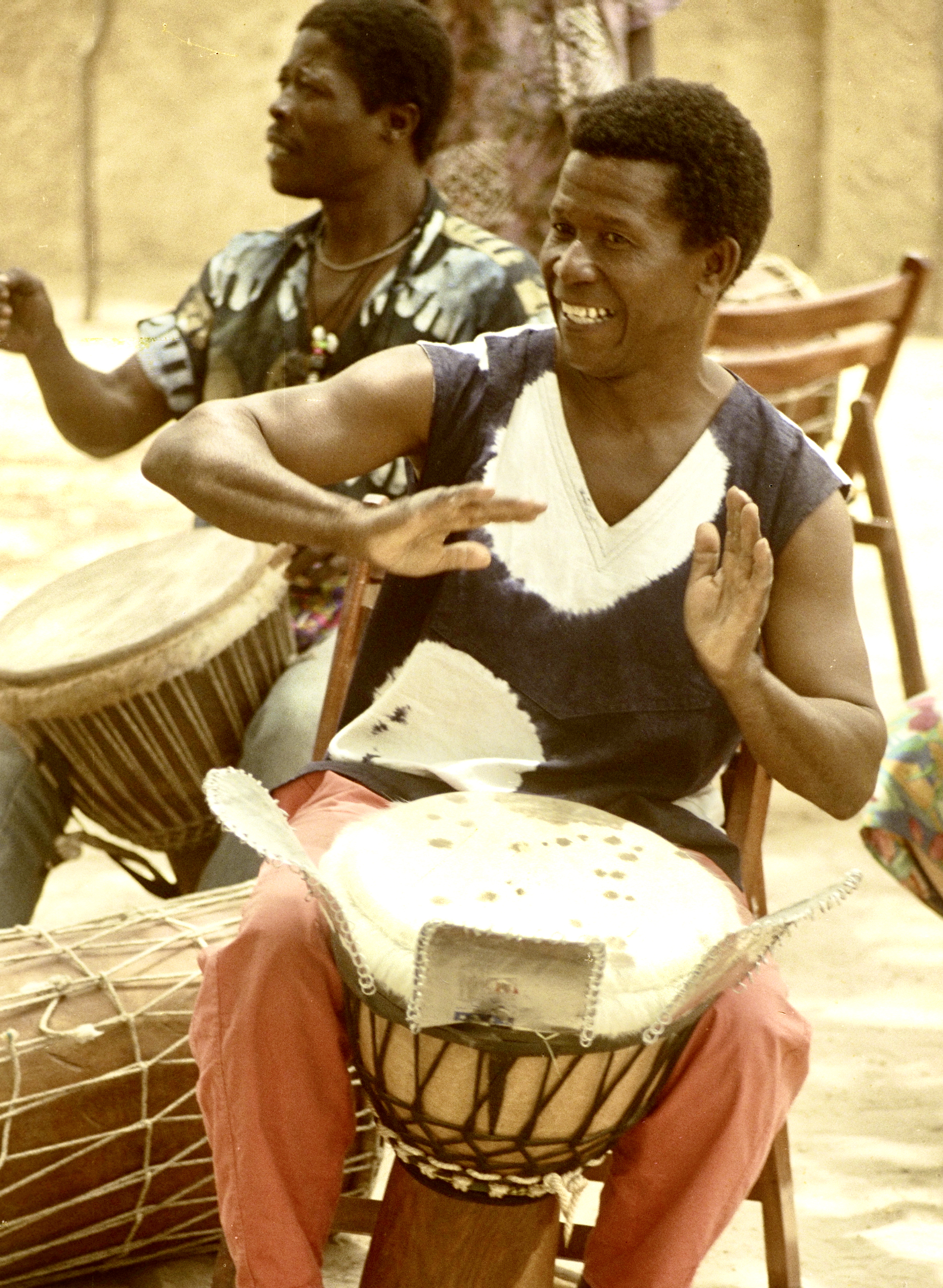 Der Djembé-Spieler Famoudou Konaté aus Guinea bei einem Workshop in Gambia